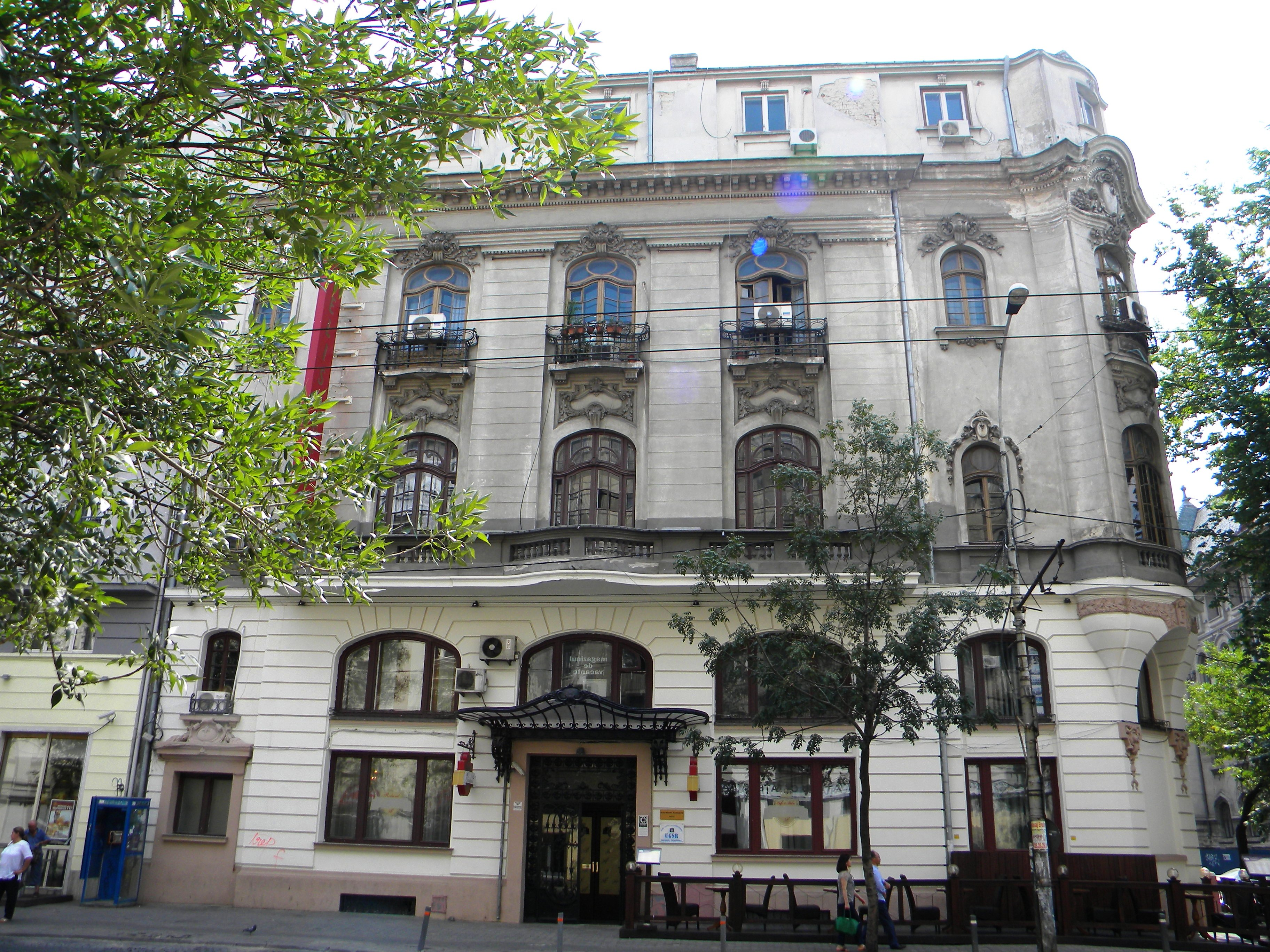 Imobil, fostul Club Austro Ungar, Bucuresti sect. 5, Bd. Elisabeta nr. 45